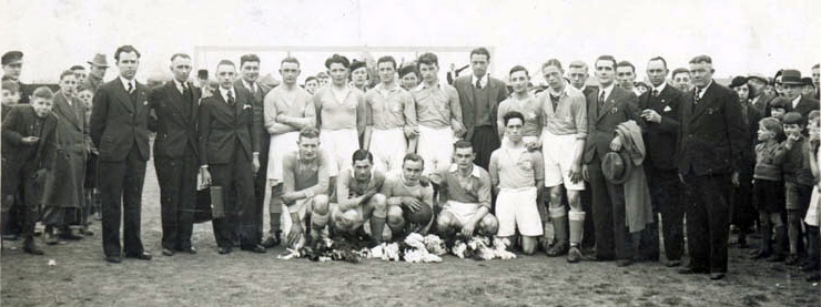 Spelers en bestuur van voetbalclub MVV uit Maastricht na een kampioenschap in de jaren 1930 in het Stadion De Boschpoort. Fotocollectie RHCL Maastricht, GAM 8147.